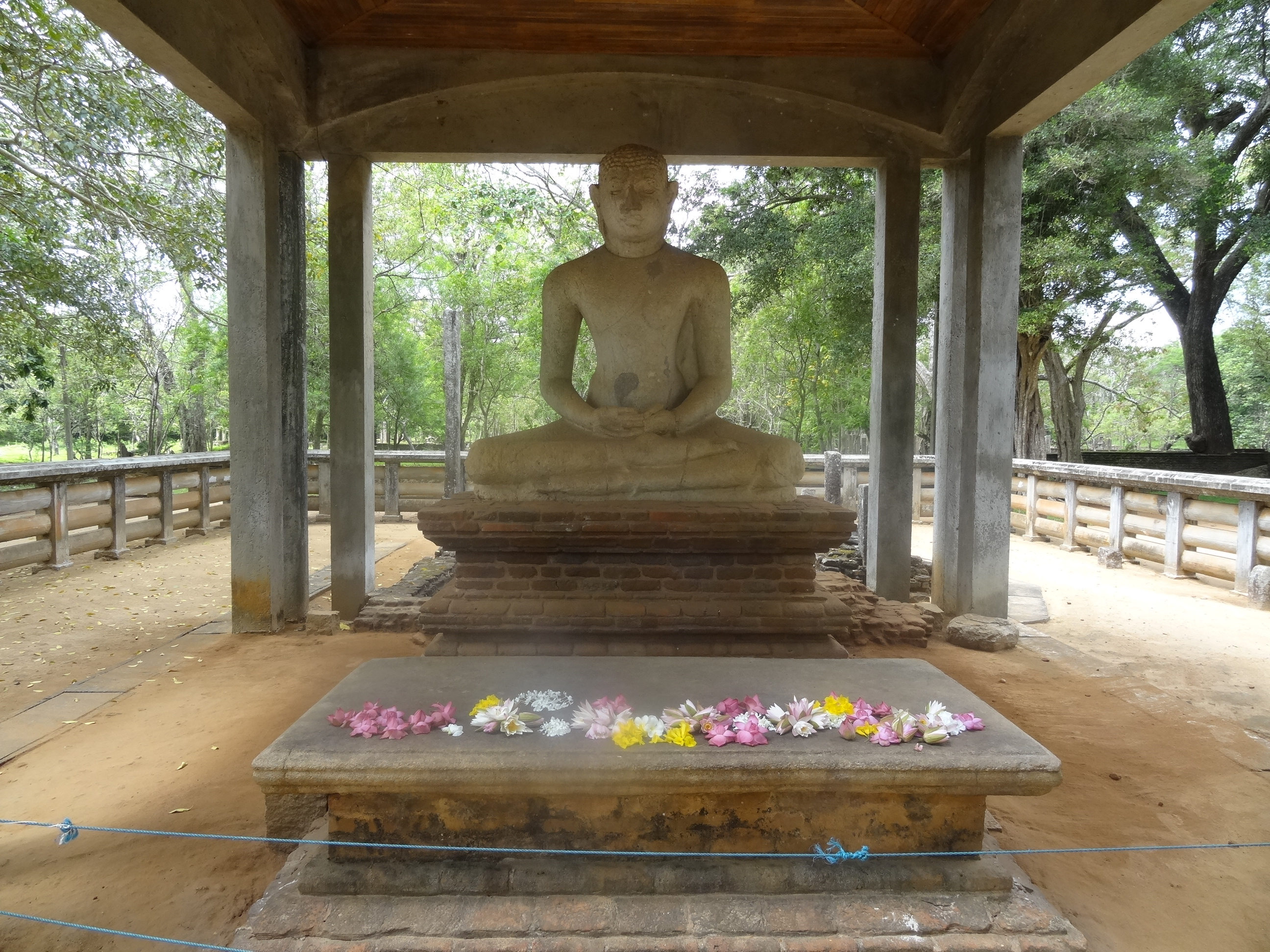 Samadhi Buddha Statue (Anuradhapura)